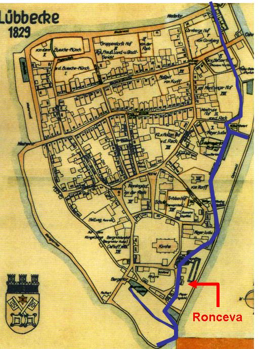 historische Karte von Lübbecke mit dem Verlauf der Ronceva